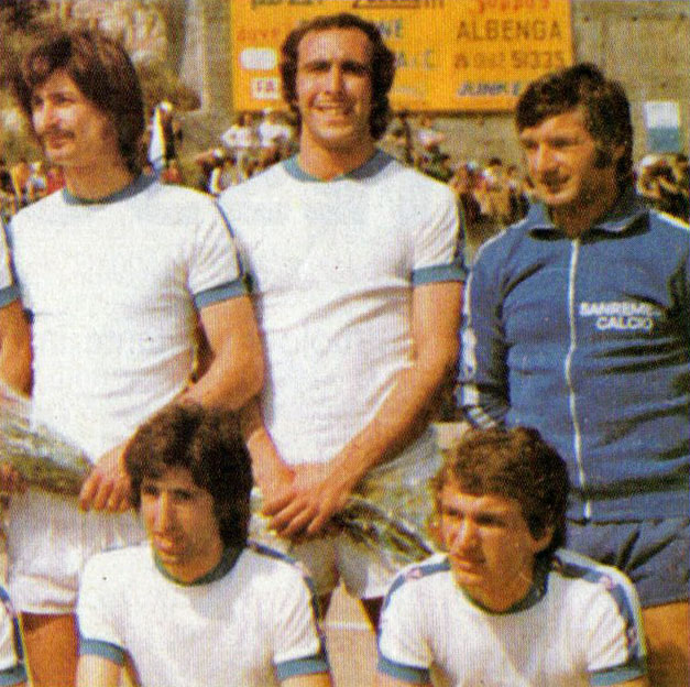 Il calciatore italiano Giampiero Ventura (in piedi, al centro) all'U.S. Sanremese nella stagione 1974-75.